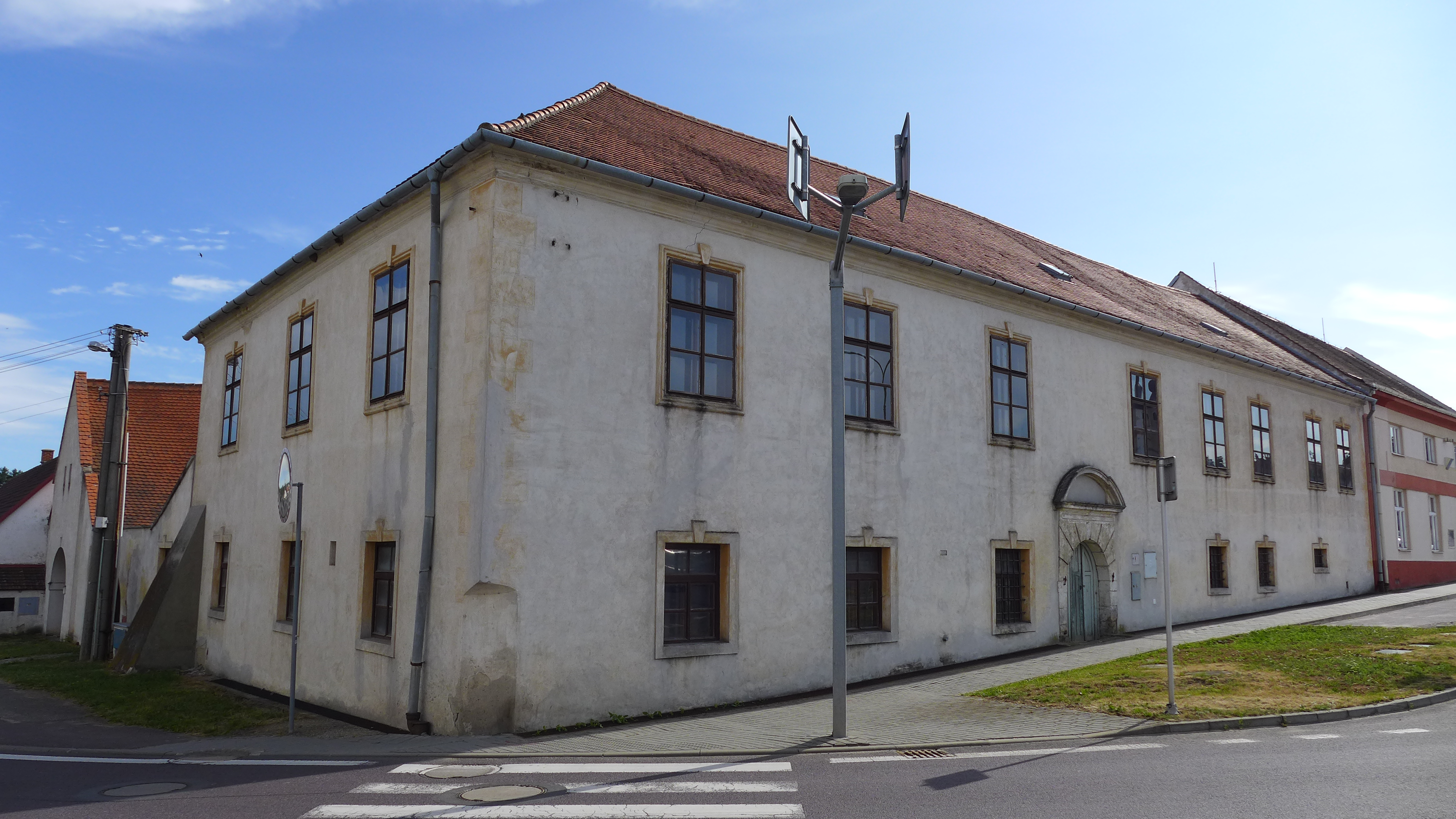 Zájezdní hostinec, Pavlice 1, Pavlice.